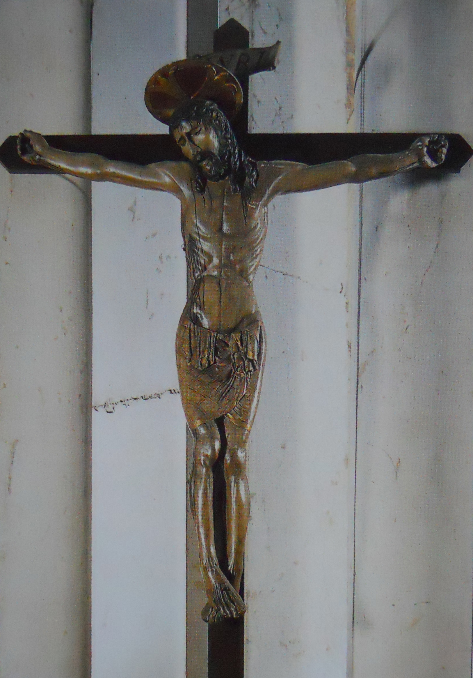 San Faustino maggiore (Brescia), il crocifisso del Quattrocento